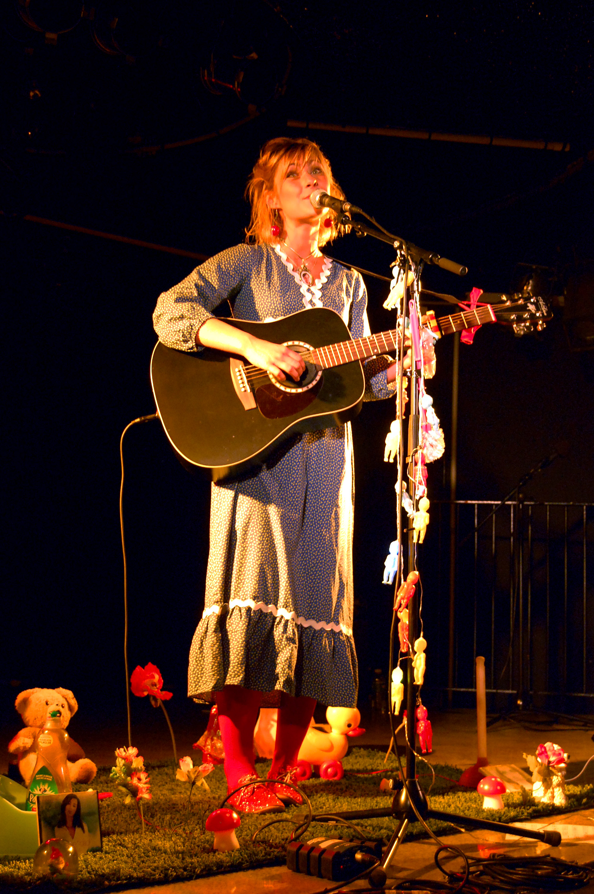 GiédRé en concert